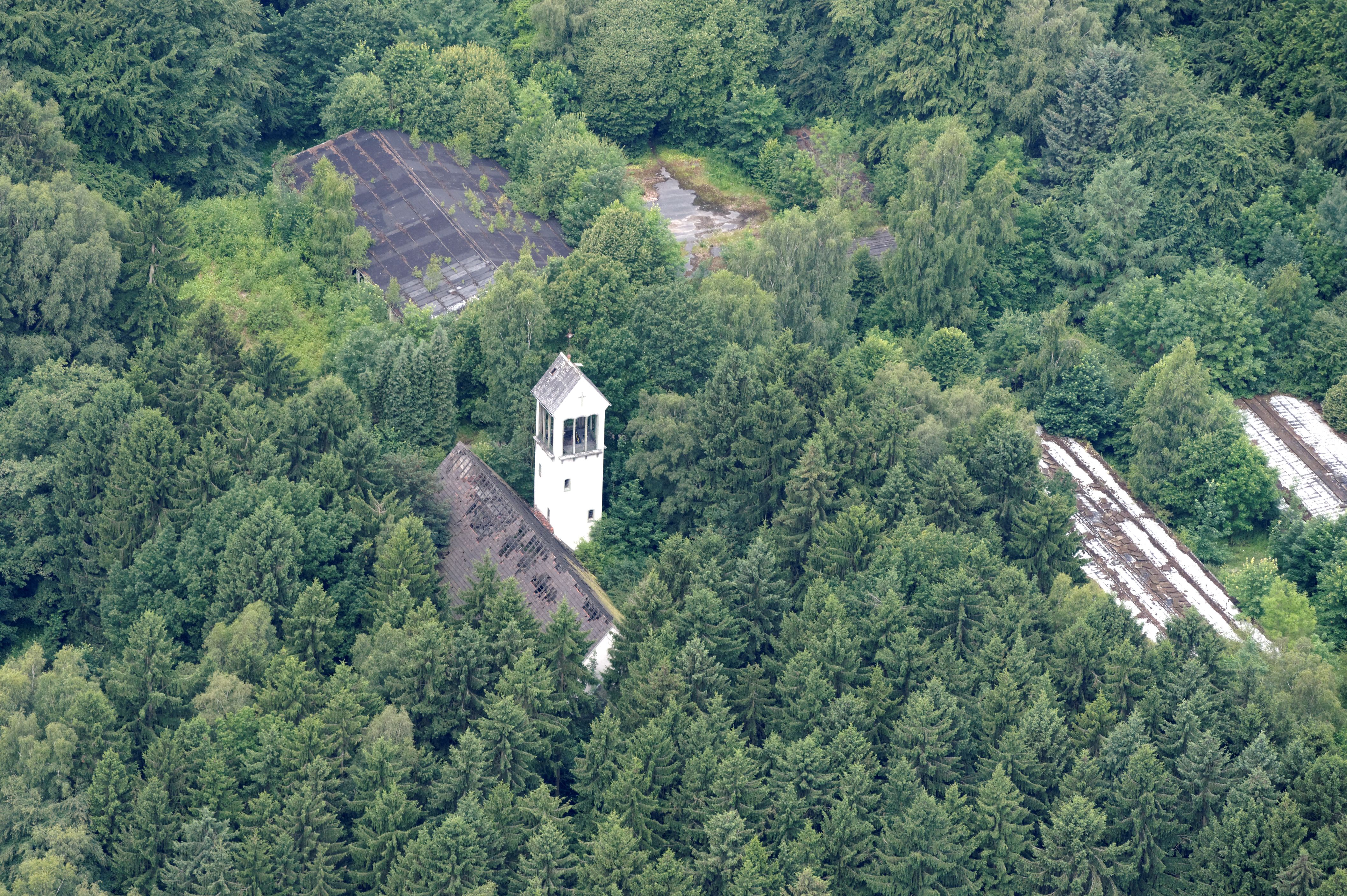 Fotoflug Sauerland Nord. Werl: Verlassene britische Kaserne Victoria Barracks mit Kirchturm im Werler Stadtwald.